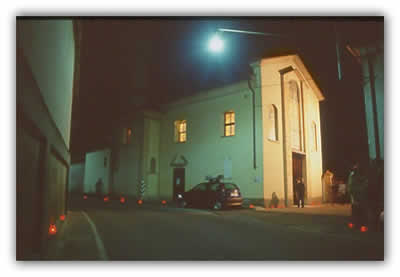 Chiesa Parrocchiale di Sant'Imerio (Ripalta vecchia) Author: EMME3 - Madignano - Italy